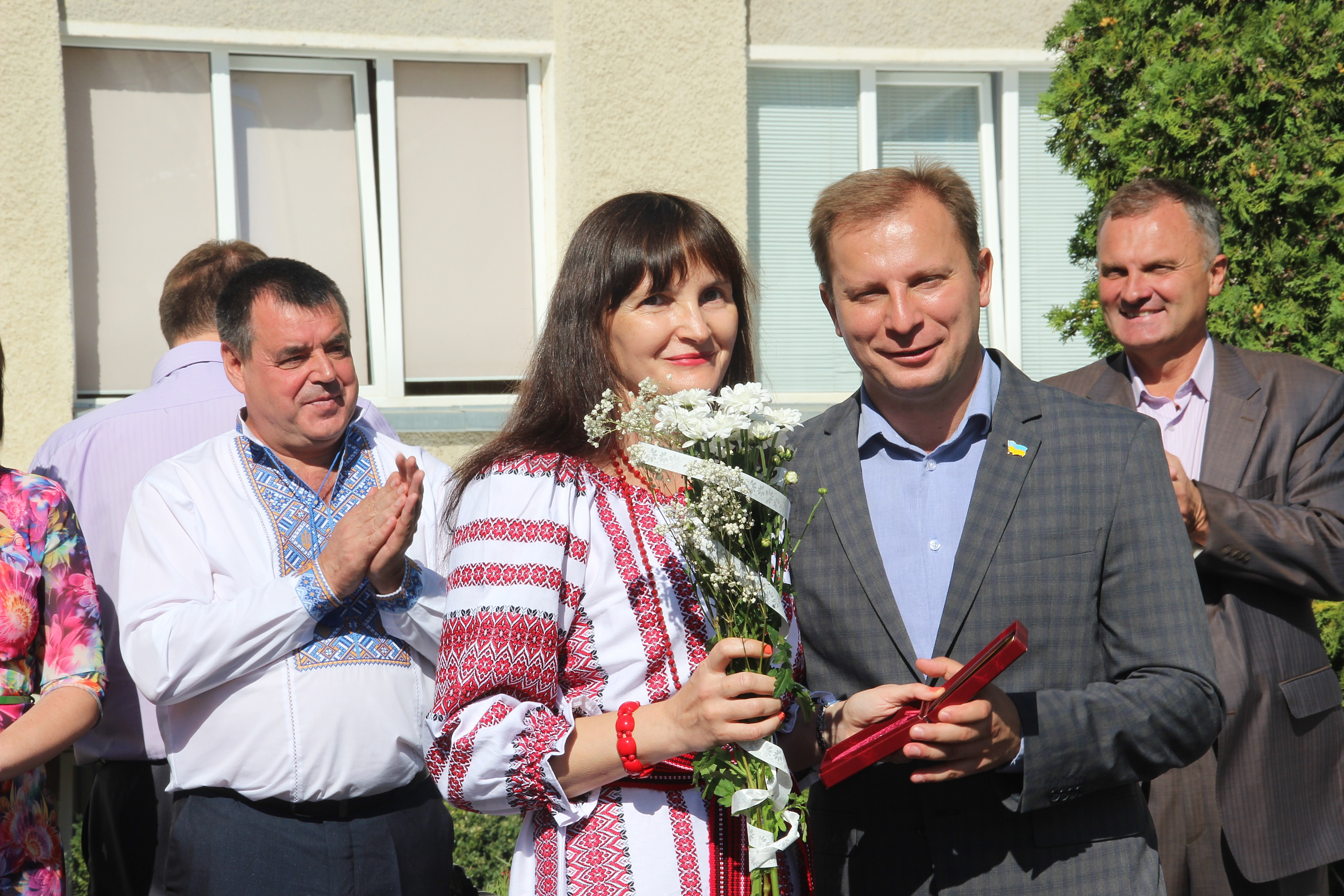 1 вересня 2016 року Оксані Дяків, редактору газети «Колос», вручено почесний знак та посвідчення "Заслужений журналіст України".